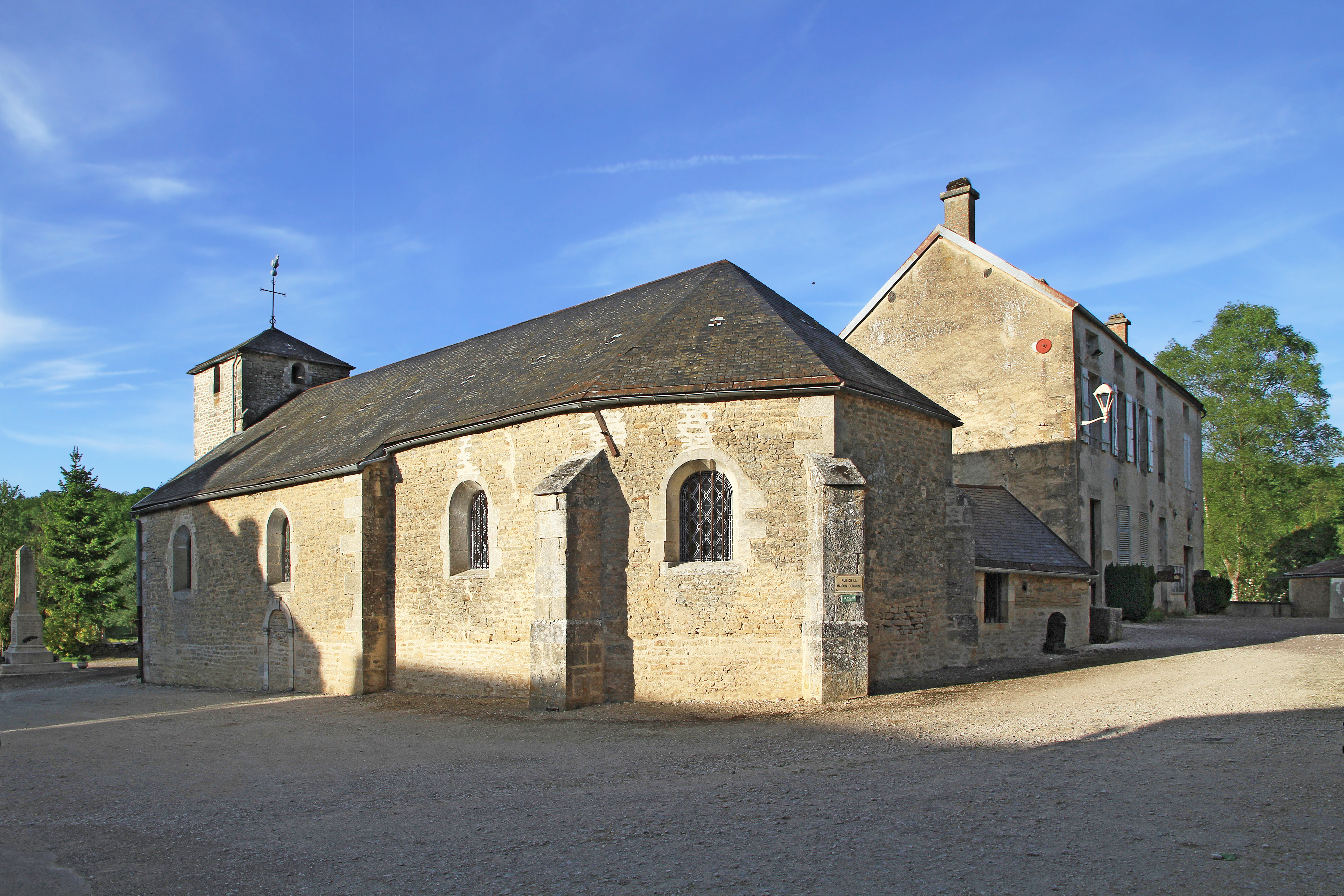 Église, mairie et monument aux morts de Duesme